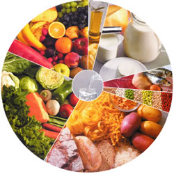 A nova roda dos alimentos